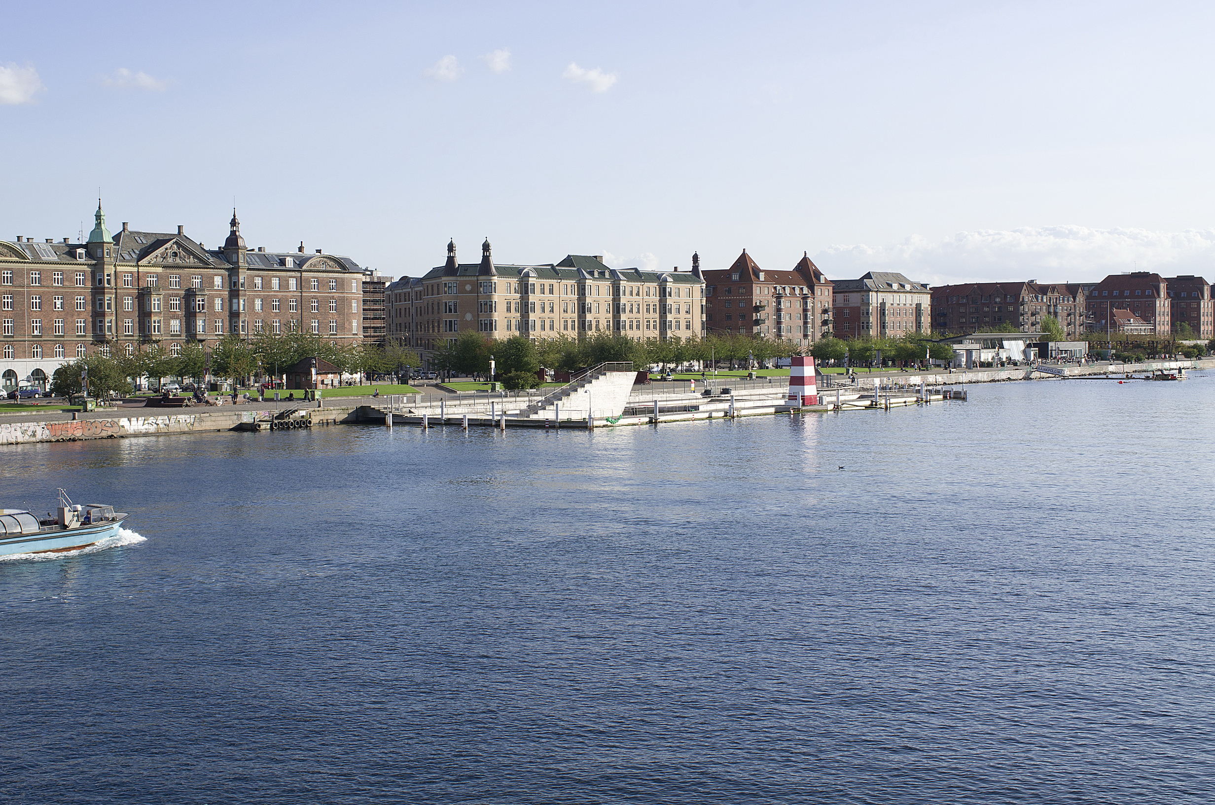 Islands Brygge waterfront in Copenhagen, Denmark